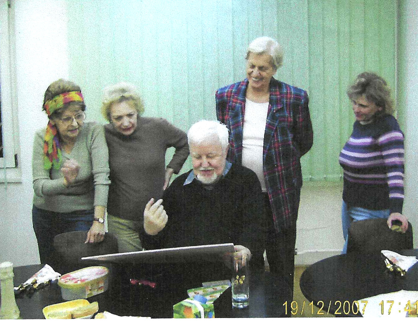 Buna Konstantin festőművész tanítványai körében2007-ben, a kondor Béla Művelődési Házban